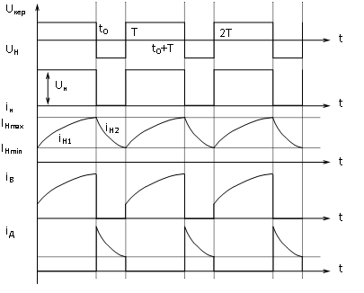 Временные диаграммы понижающего преобразователя напряжения